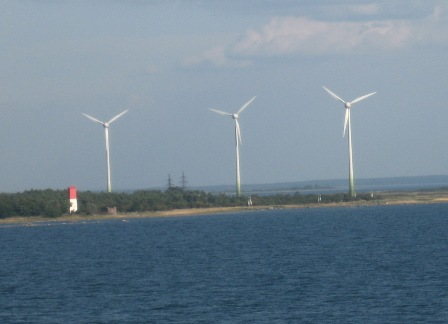 Wind turbines in Virtsu (Estonia)